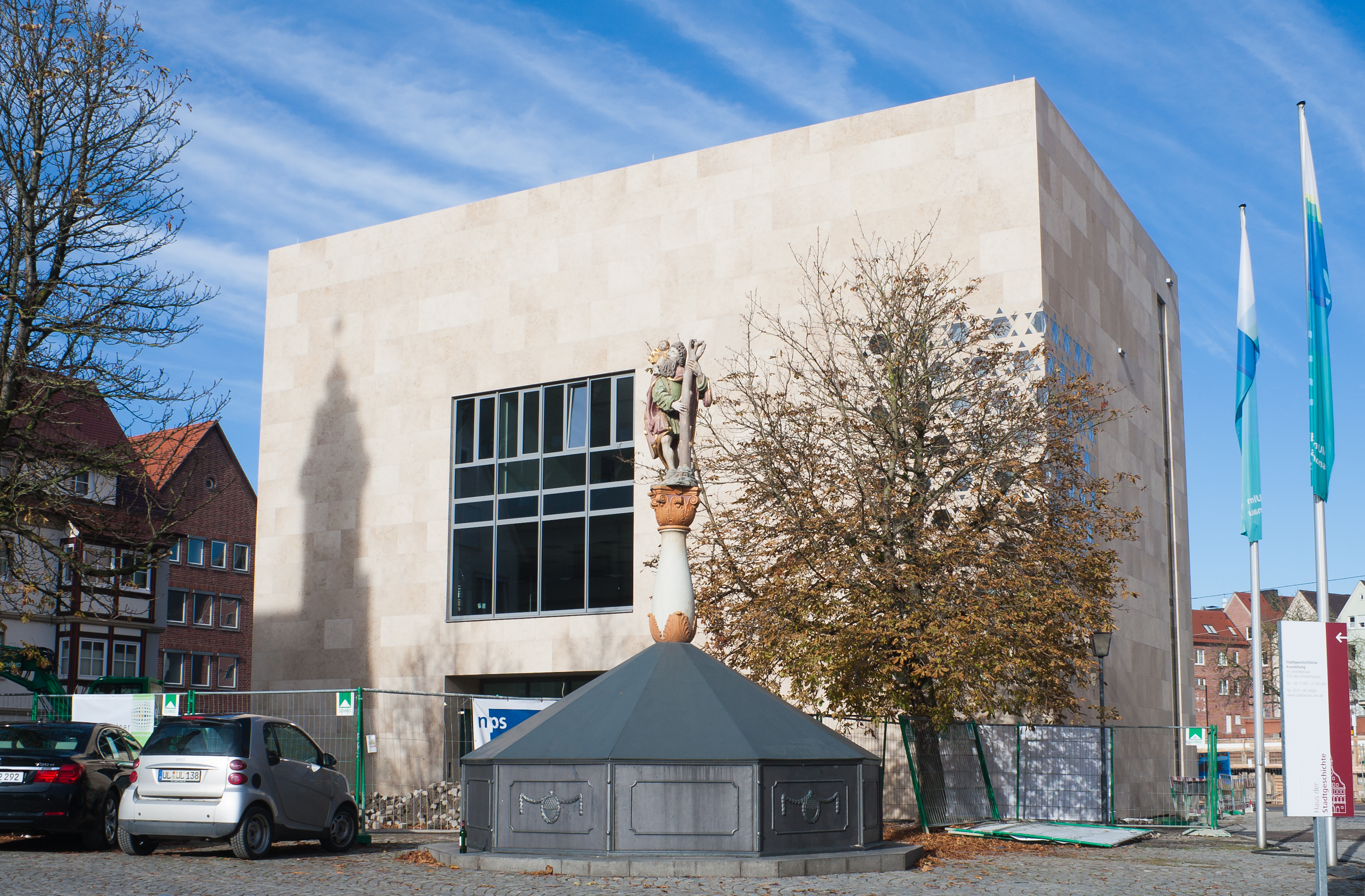 Ulm, Baden-Württemberg, Germany